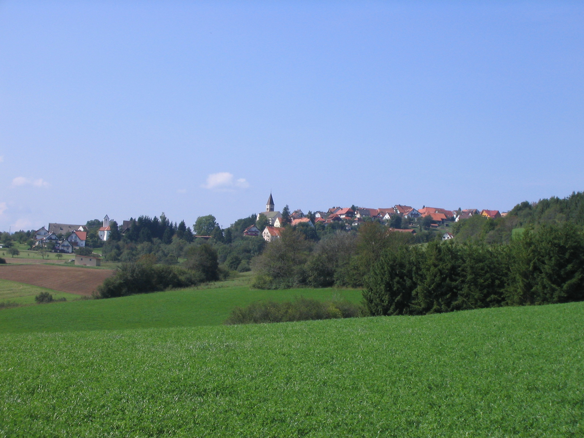 Göschweiler, Ortsteil von Löffingen, Deutschland